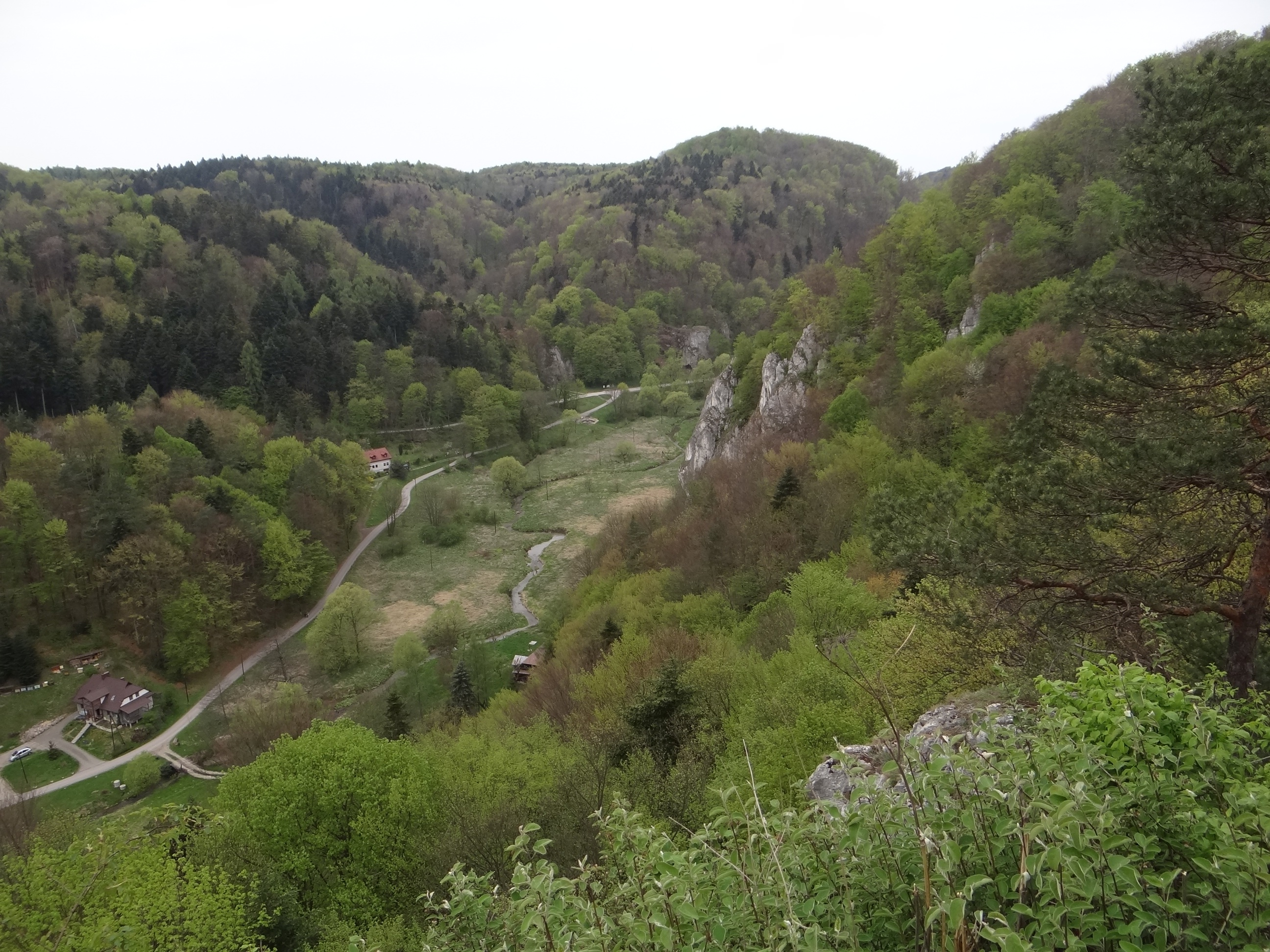 Dolina Prądnika. Widok z Góry Okopy